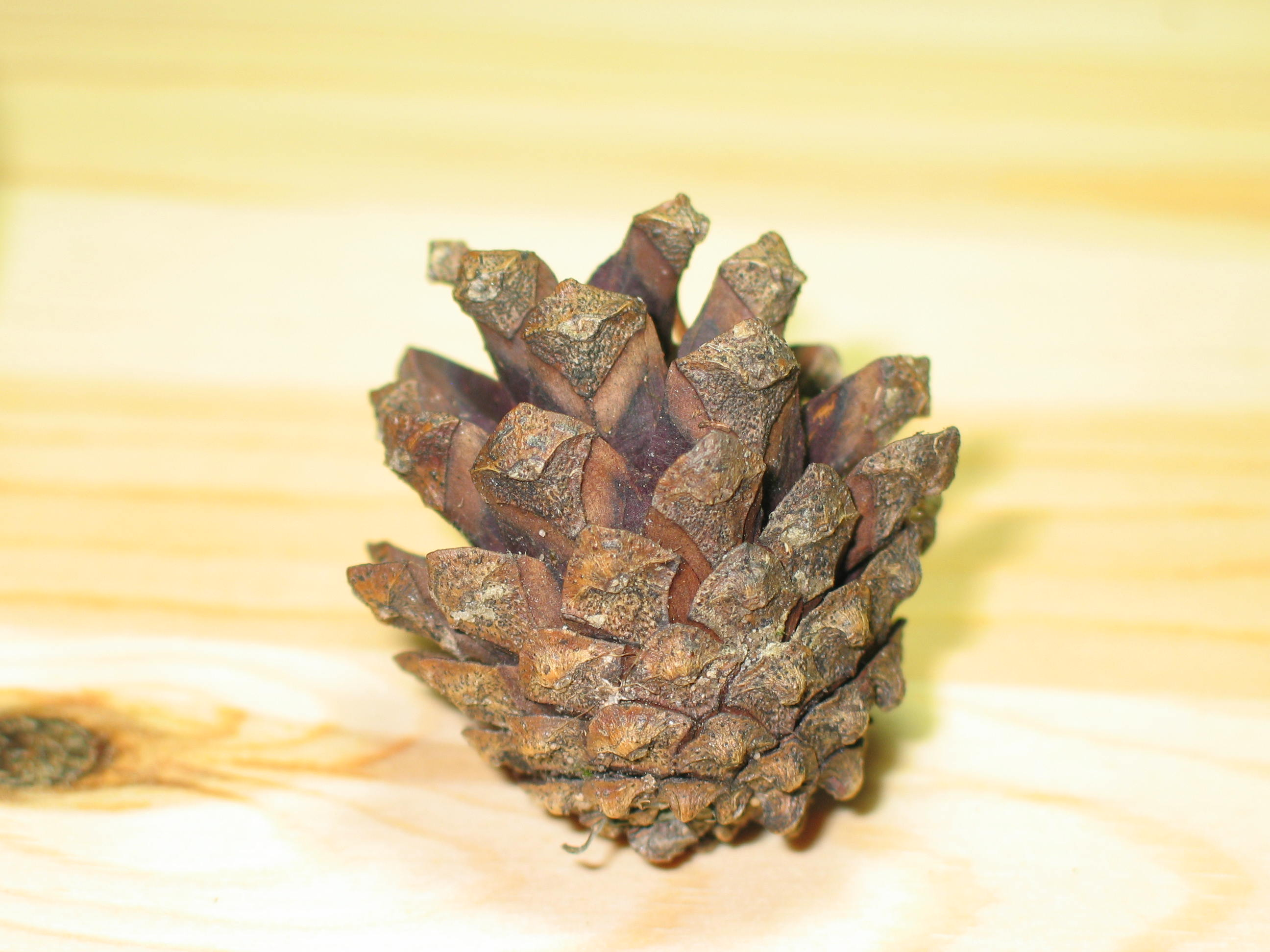 alter trockener offener Kiefernzapfen